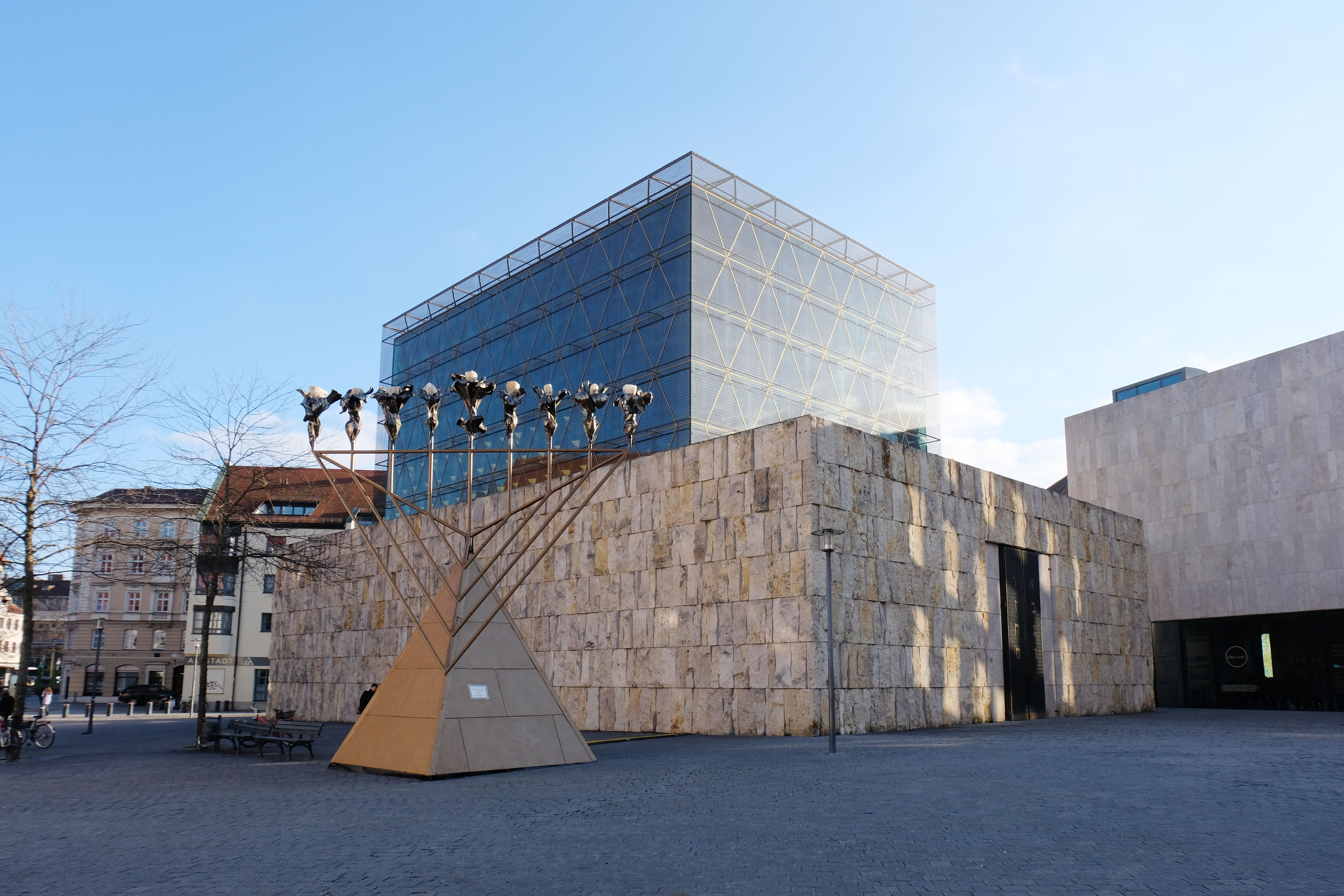 Die Münchner Hauptsynagoge Ohel Jakob mit Chanukkia von Gershom v. Schwarze, gestiftet von Tita Korytowski im Dezember 2019